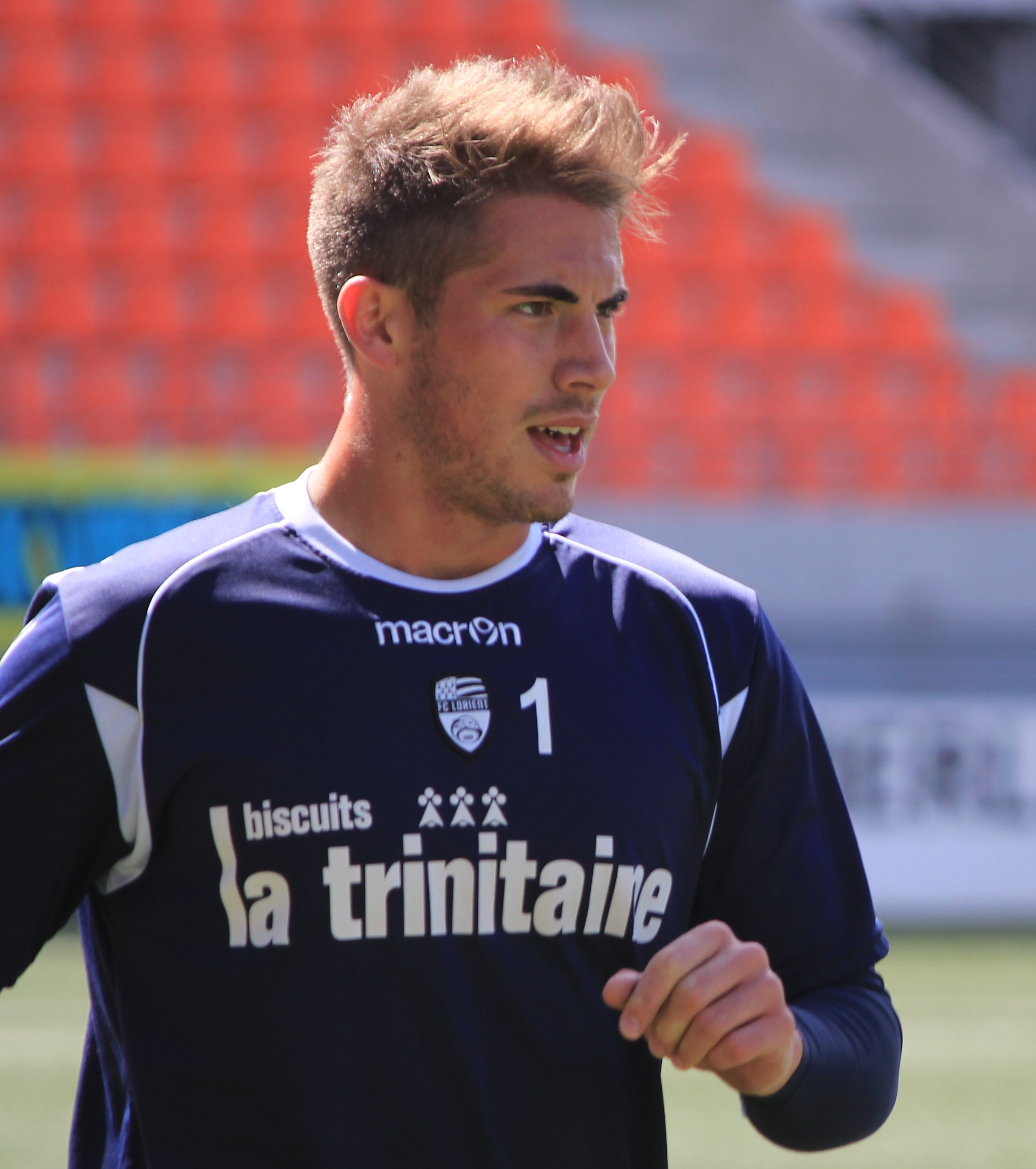 Lecomte pendant un entrainement du FC Lorient le 24 mai 2013